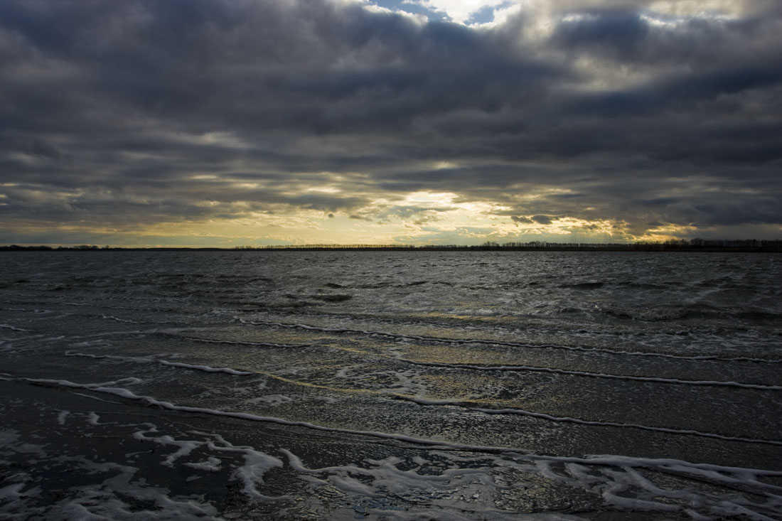 Озеро Солёное — лечебные грязи и соленая вода